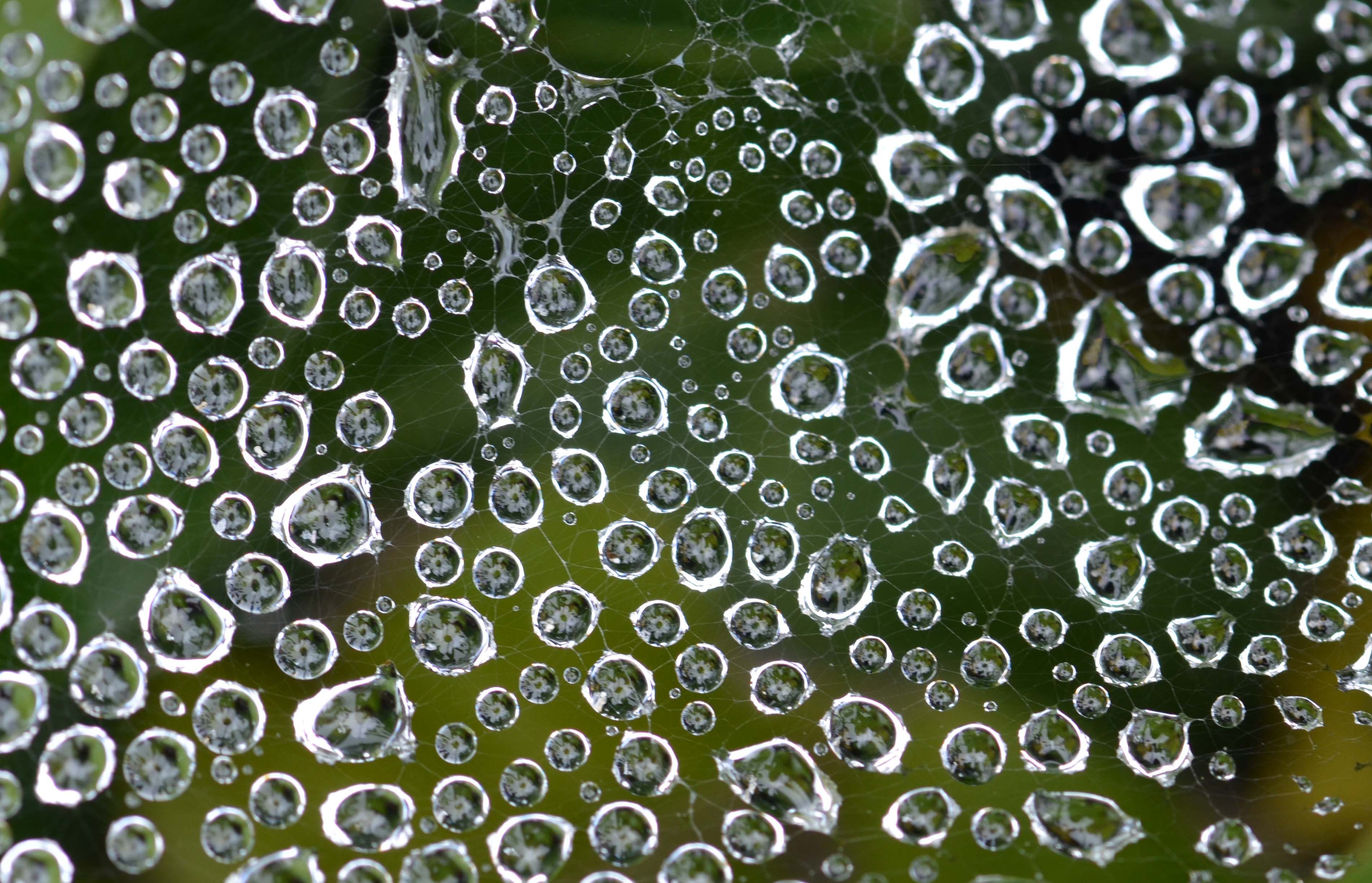 Gouttes d'eau (bruine) sur toile d'araignée, Bretagne